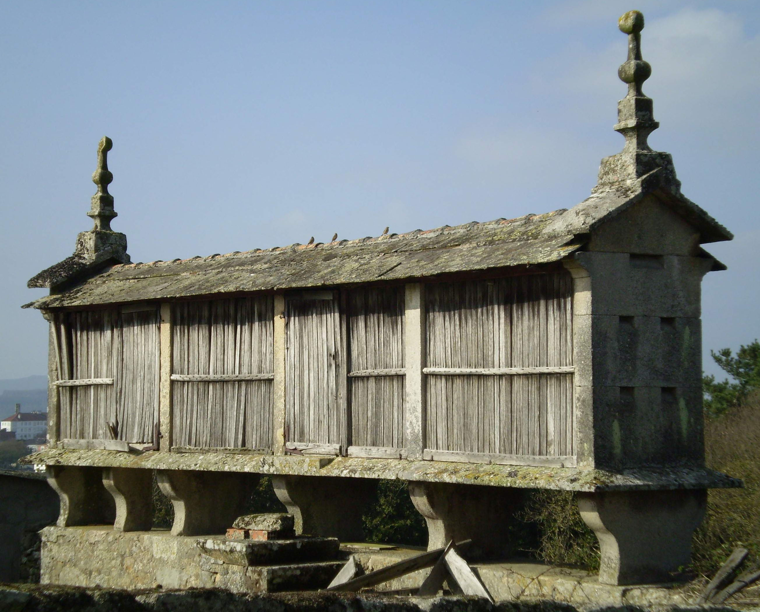 Hórreo de tipo mahía, de catro claros, sobre soleira e seis cepas (a sexta probablemente de reforzo) copiformes. Presenta dúas portas laterais e con cuberta de lousa. Adornado con dous esveltos lampións de figuras xeométricas con acabado esférico. Ubicado no lugar de San Xurxo de Terrachá (Antas de Ulla)